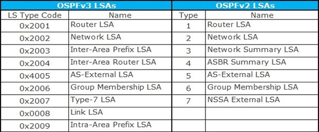 Монгол: зураг3